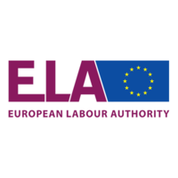 Logo der Europäischen Arbeitsmarktbehörde